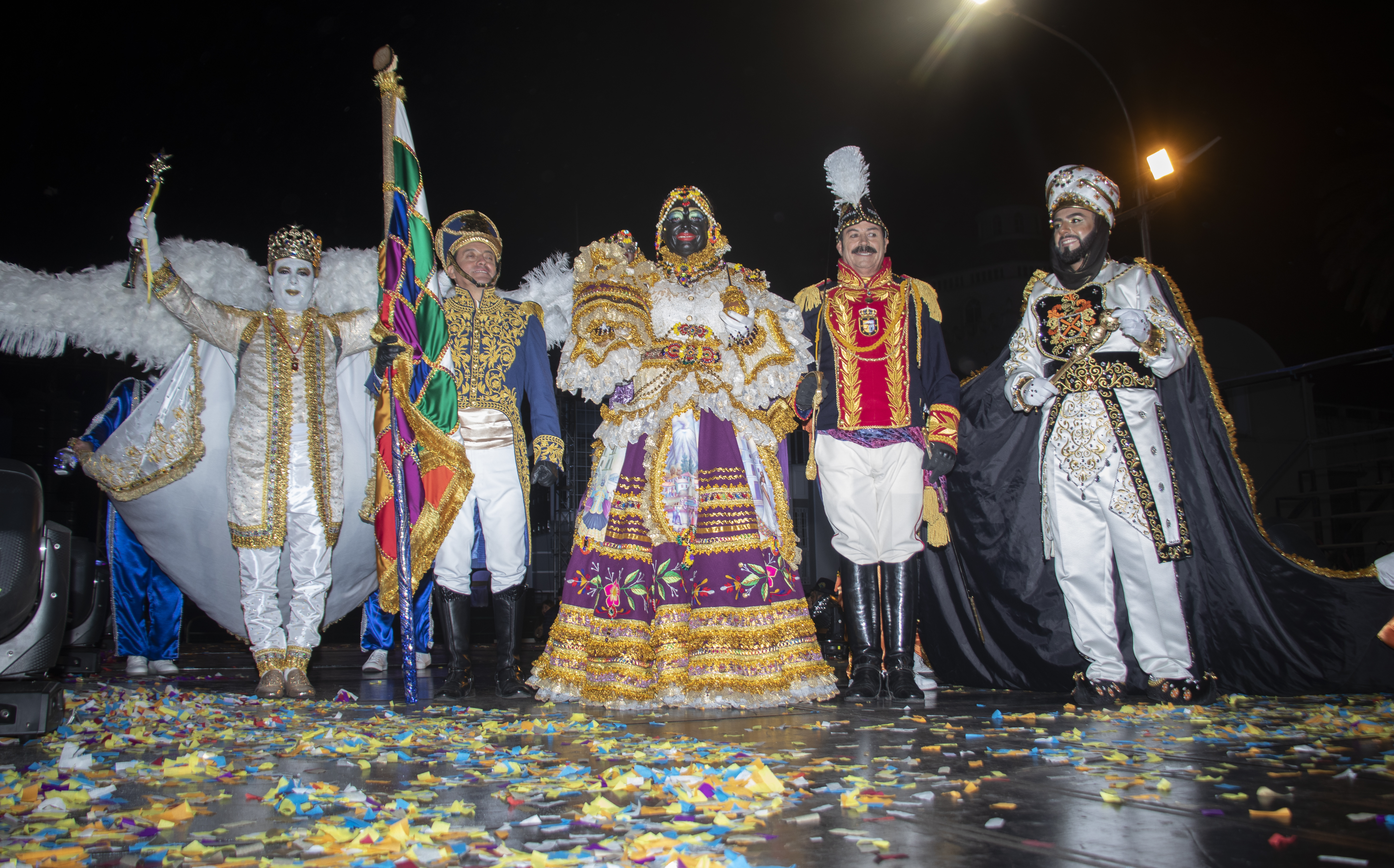 Cambio de Mando Mama Negra 2019